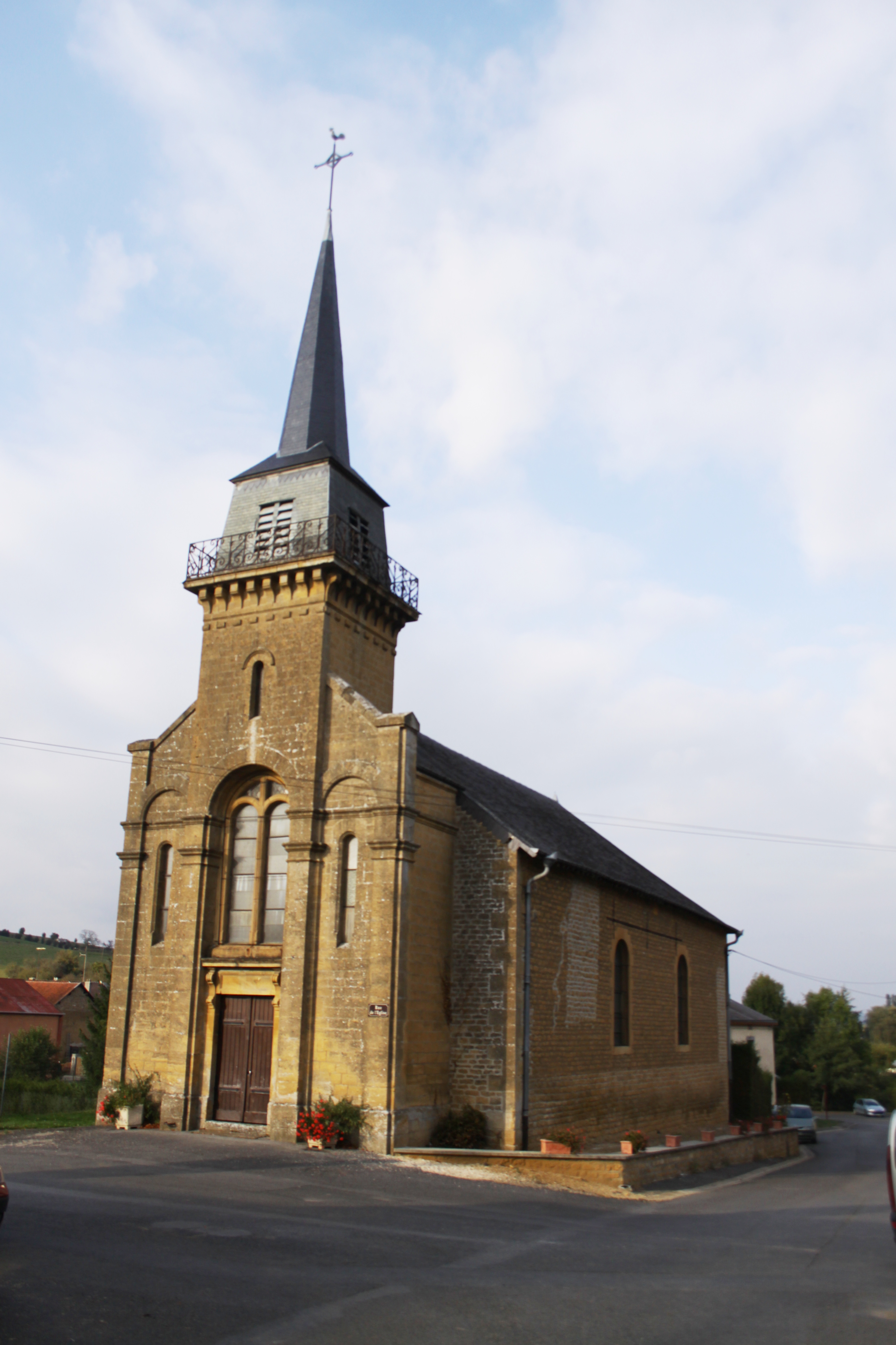 Village Ardennais